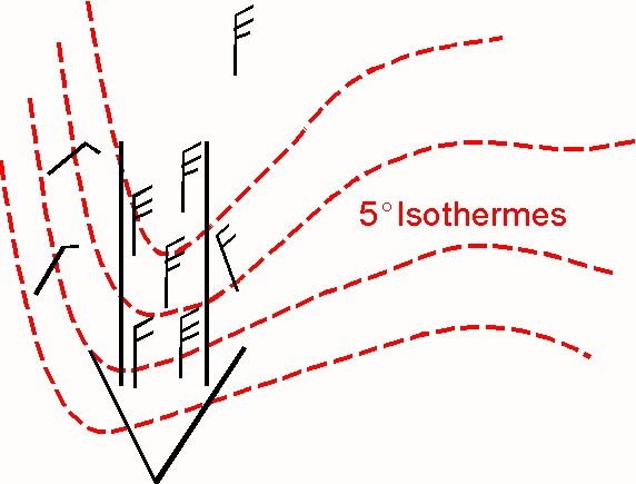 Injection d'air froid à 850 hPa qui est signe de développement des dépressions météorologiques